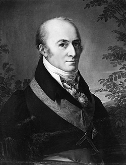 Heinrich Wilhelm von Zeschau portret, verschenen in "Erinnerungen an Heinrich Wilhelm von Zeschau", Dresden 1866